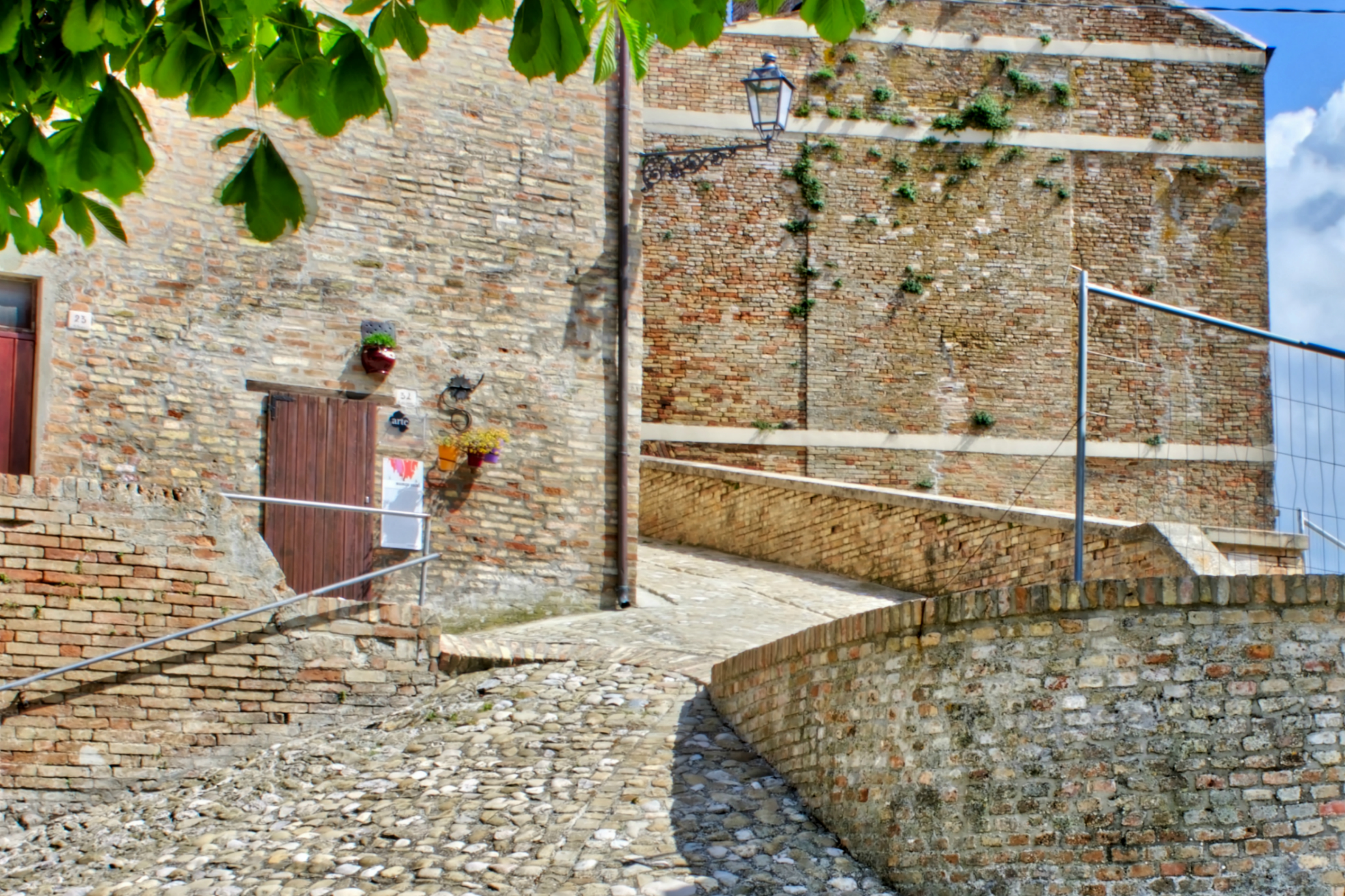 Maurizio Virgili è un artista che lavora nel suo atelier presso il Castello Vecchio di Carassai dove non circolano auto, motorini o bici e dove, anche in estate, i residenti sono molto pochi. È possibile osservarlo all'opera, tutte le volte che non è fuori per delle mostre, circondato dall’atmosfera tranquilla dei vicoli.